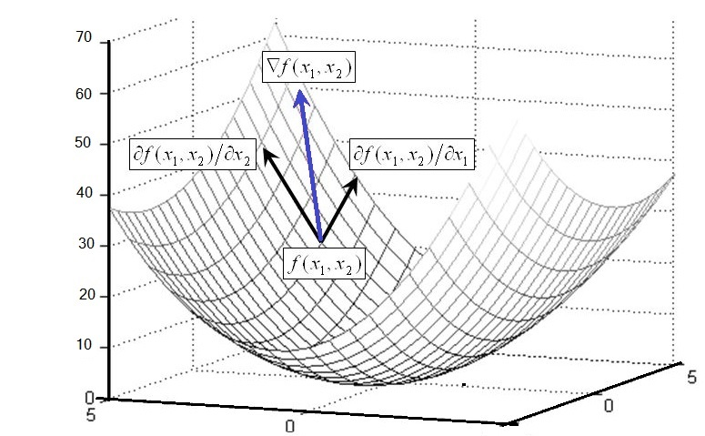 ചിത്രത്തിൽ കറുത്ത സദിശങ്ങൾ രണ്ടും x1, x2 എന്നീ രണ്ടു ചരങ്ങളെ അധിഷ്ഠിതമാക്കിയ ഭാഗിക അവകലജങ്ങളെ സൂചിപ്പിയ്ക്കുന്നു. രണ്ടു ദിശകളിലും ചെരിവ് ഉണ്ട്. ചുവന്ന സദിശമാണ് ഇവയുടെ സംയുക്തമായ ഗ്രേഡിയന്റ്.